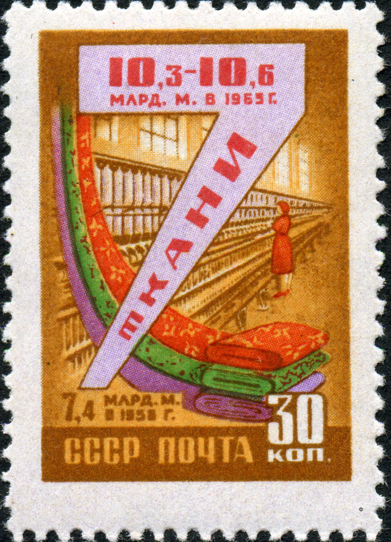 Марка СССР